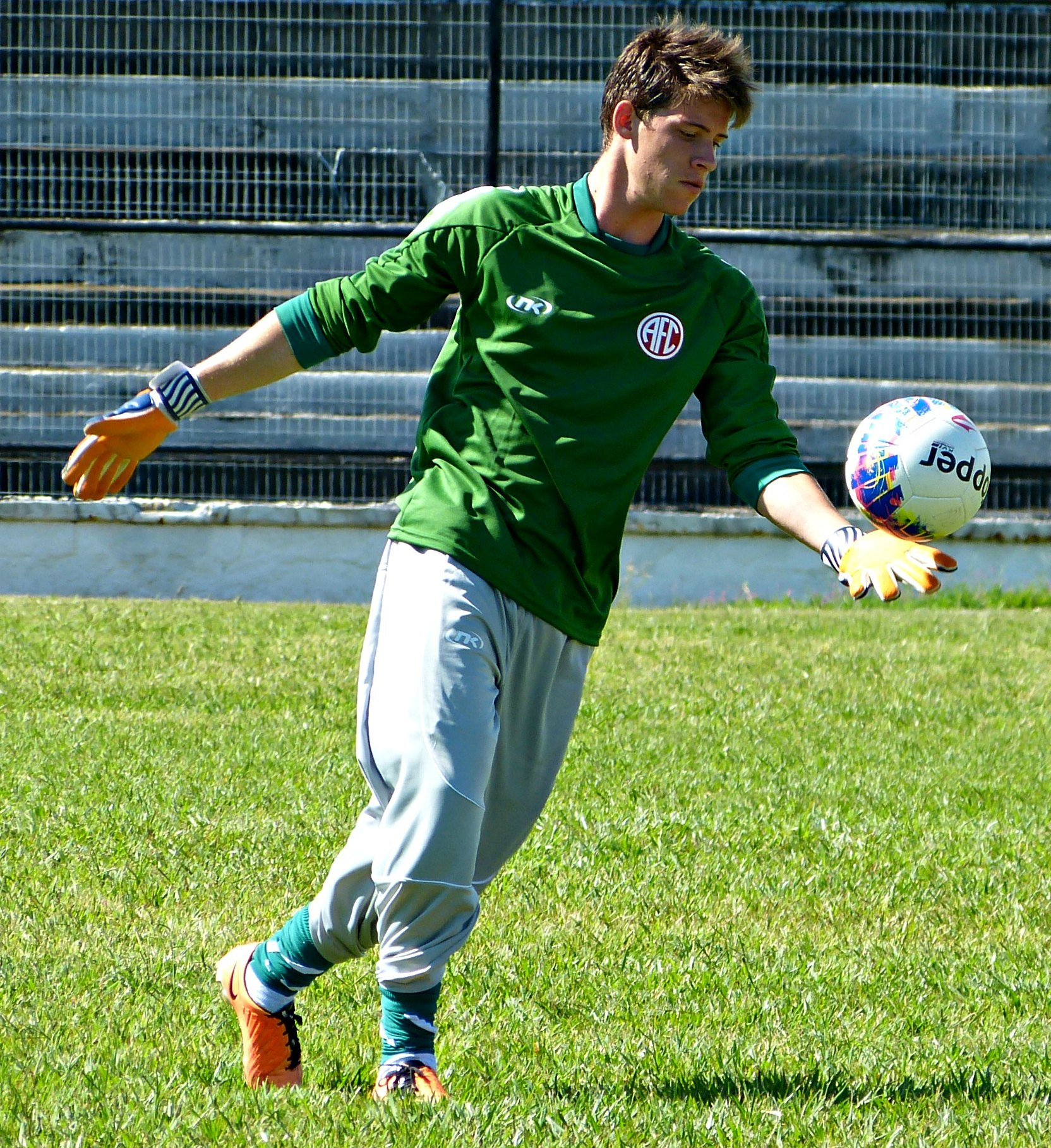 fotos temporada 2015